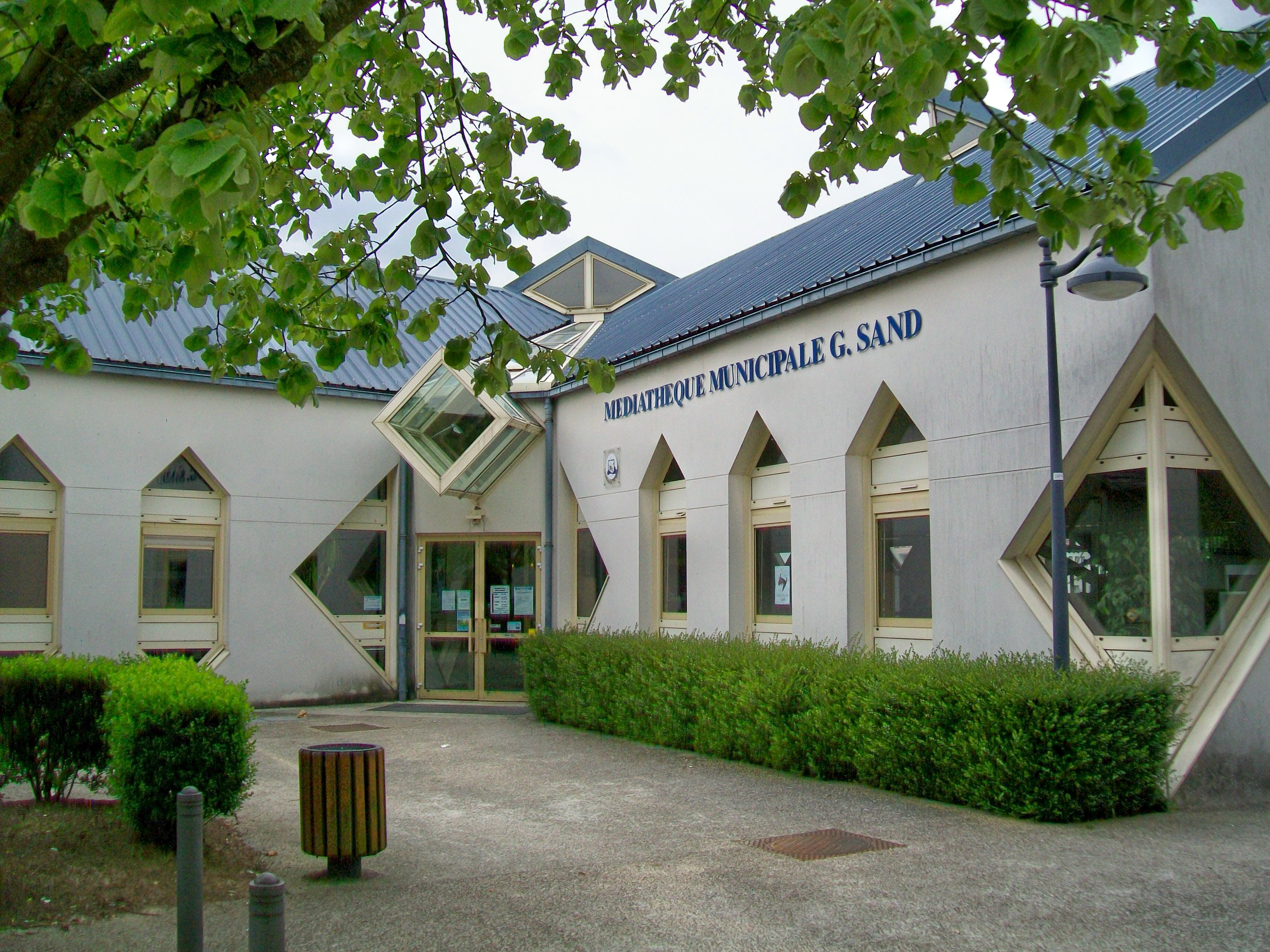 La médiathèque George Sand, sur le parking à côté de l'église St-Jean.